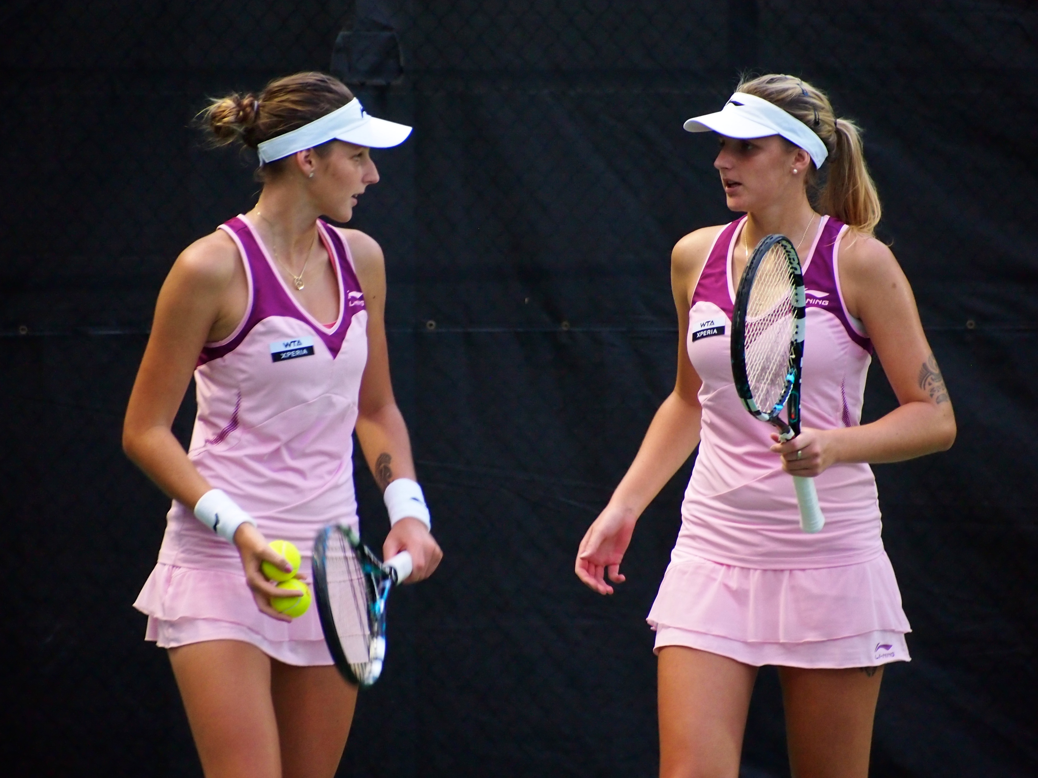 Czech sisters Kristýna (left) and Karolína (right) Plíšková talk doubles strategy